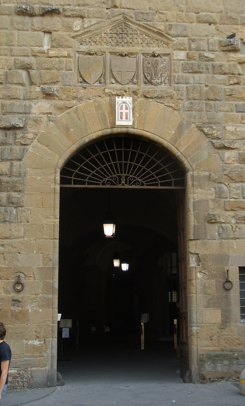 Palazzo vecchio, porta della dogana